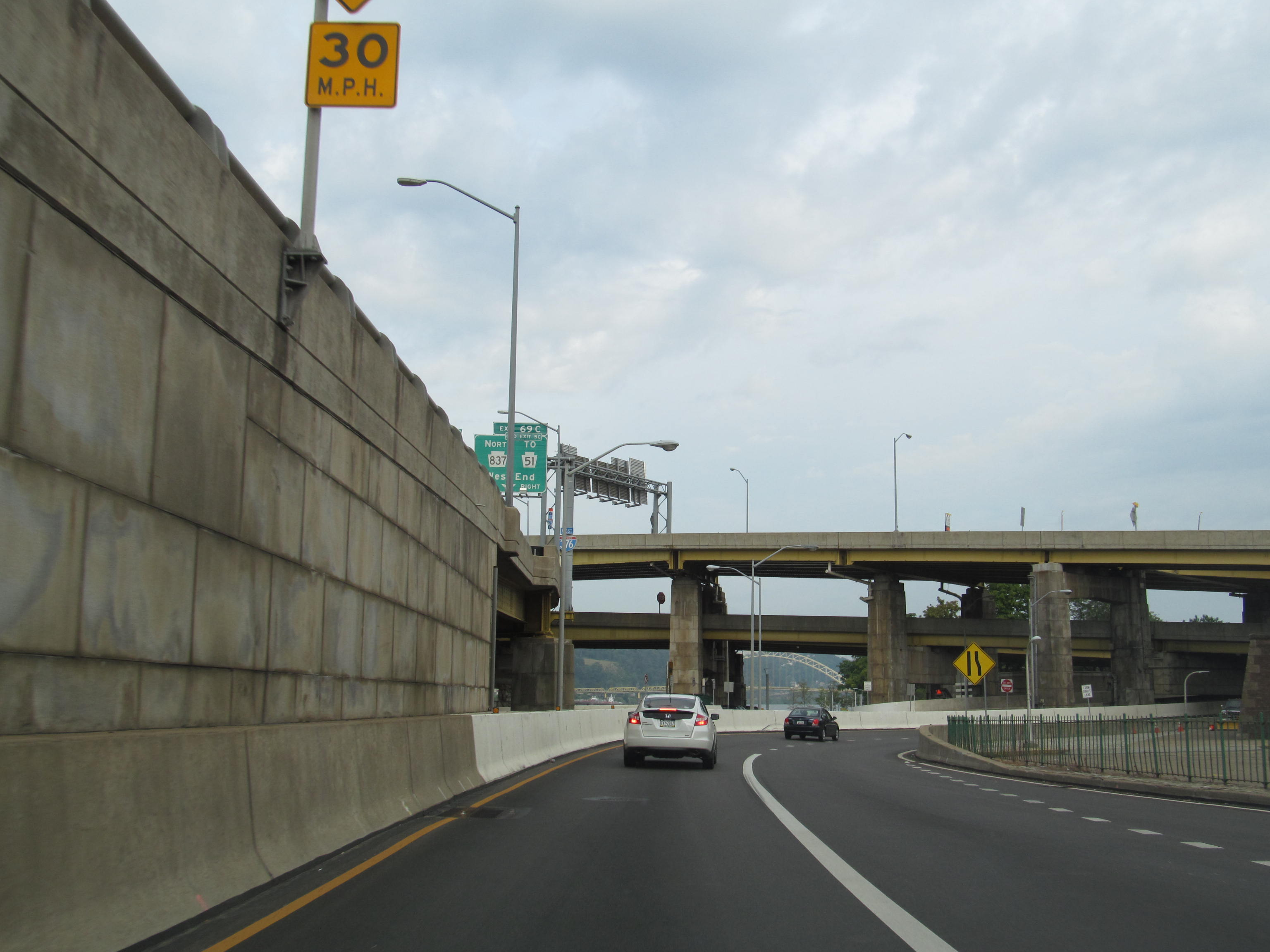 Interstate 376 - Pennsylvania